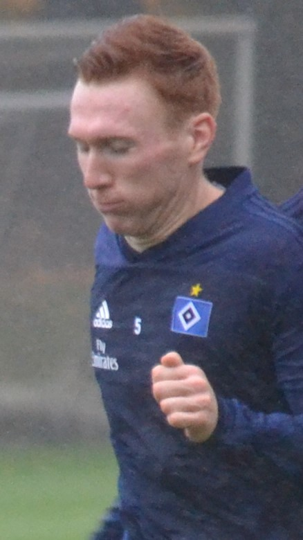 David Bates beim Training des Hamburger SV am 18. Oktober 2018.